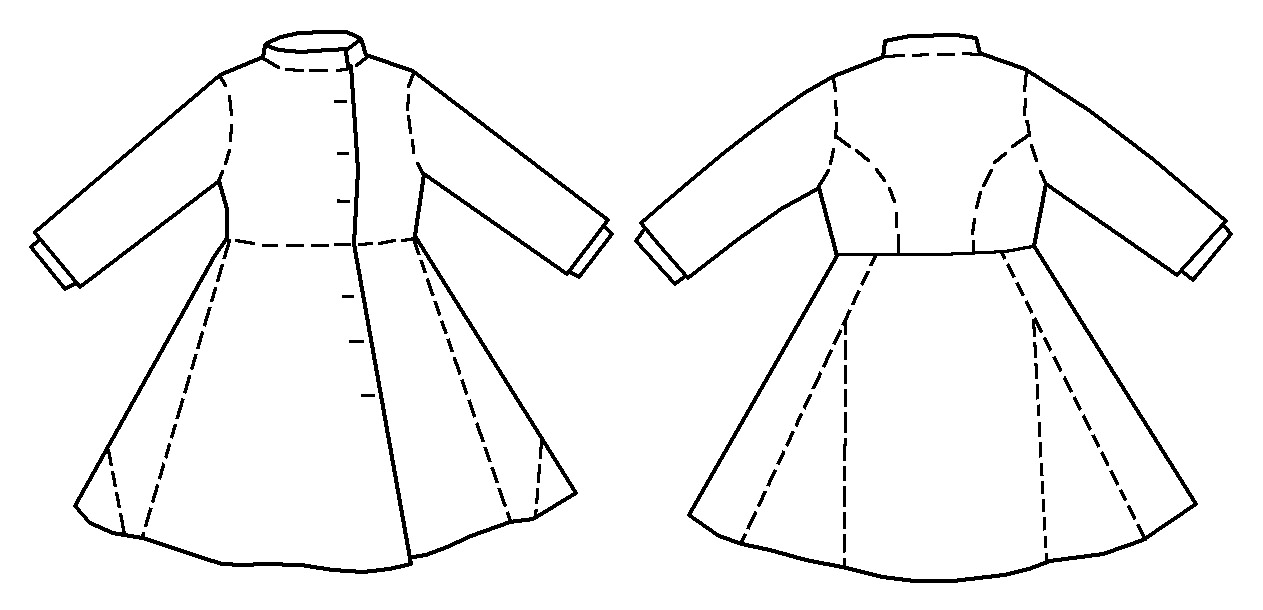 Зипун. Часть верхней одежды традиционного русского костюма.